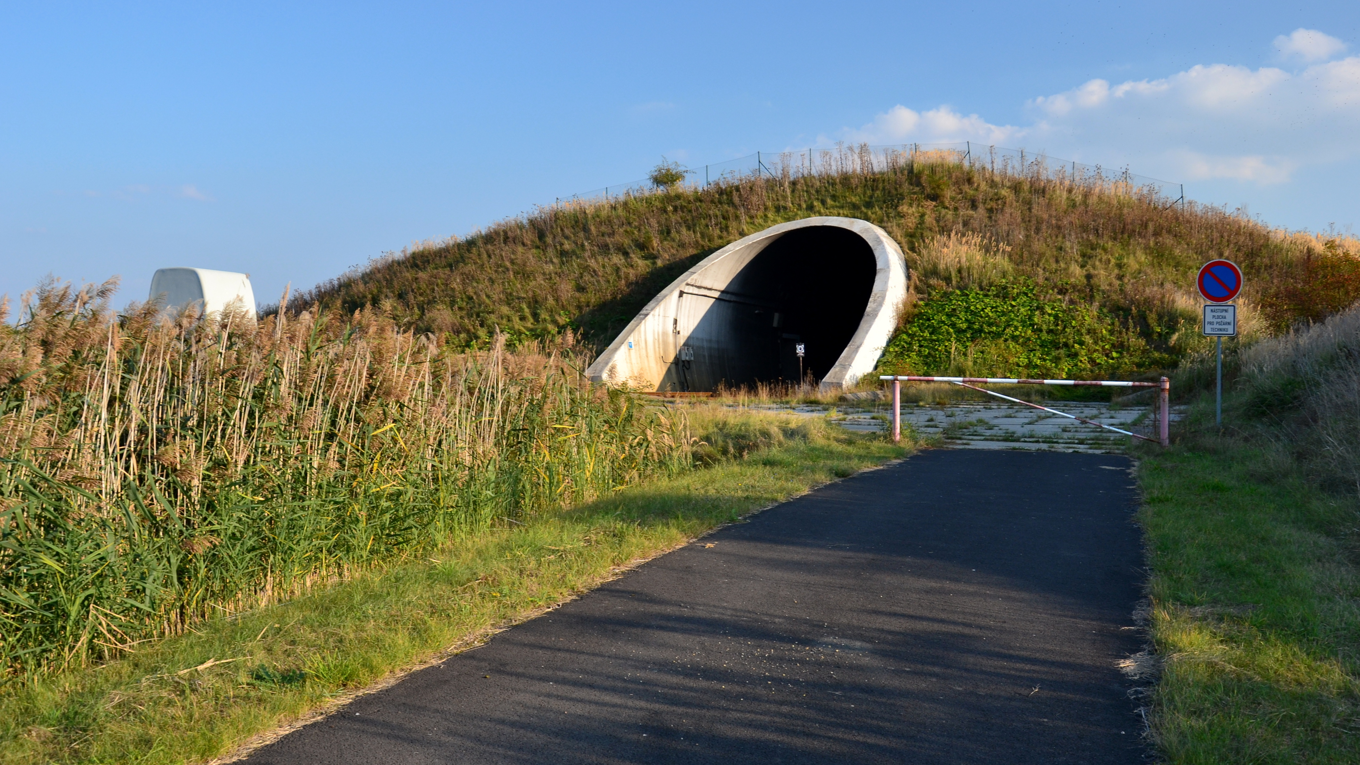 Březenský tunel u Droužkovic